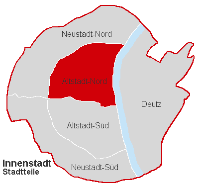 Lagekarte Altstadt-Nord im Stadtbezirk Köln-Innenstadt